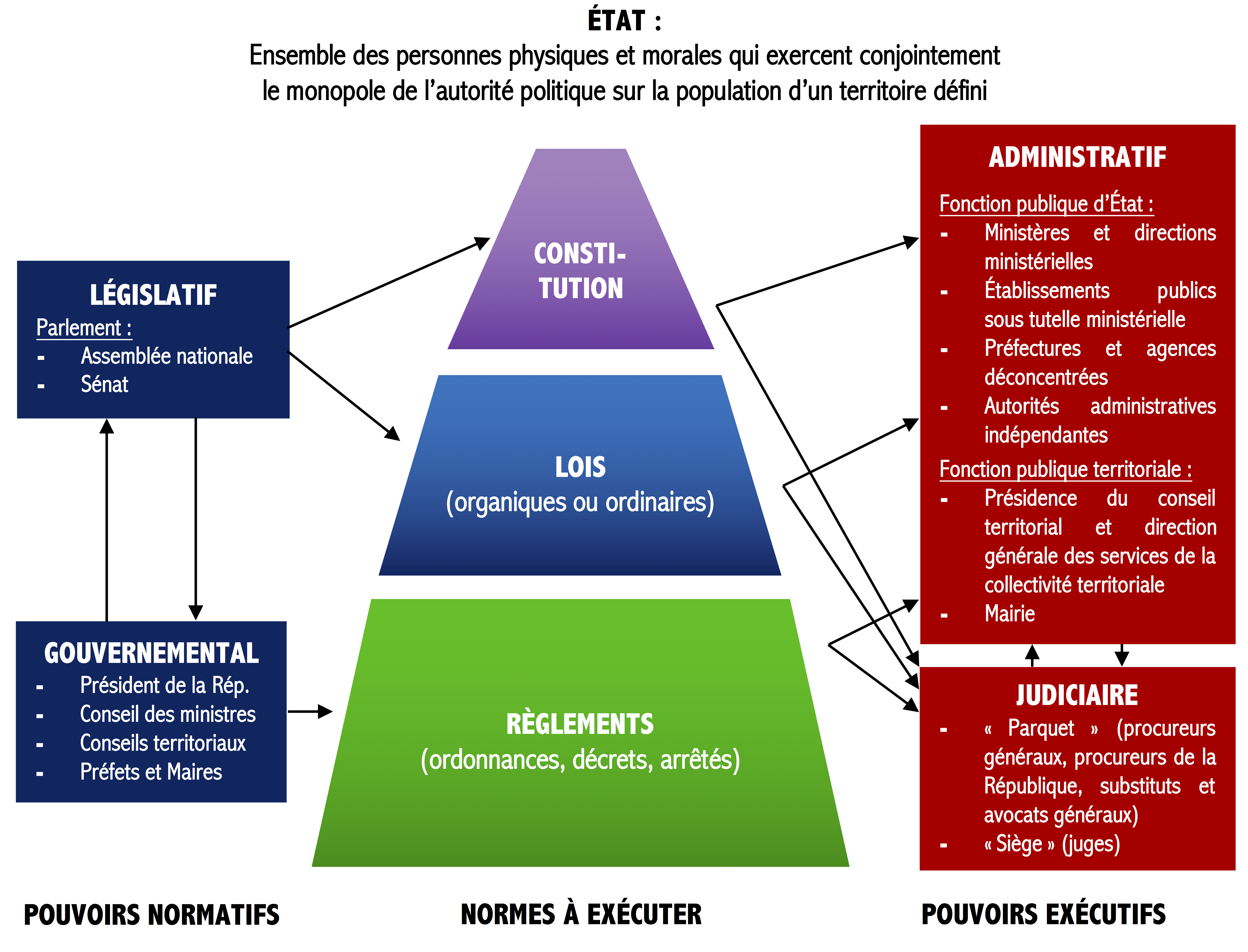 Organigramme de la Cinquième République selon la théorie des quatre fonctions élémentaires (législative, gouvernementale, administrative et judiciaire) de Gérard Bergeron